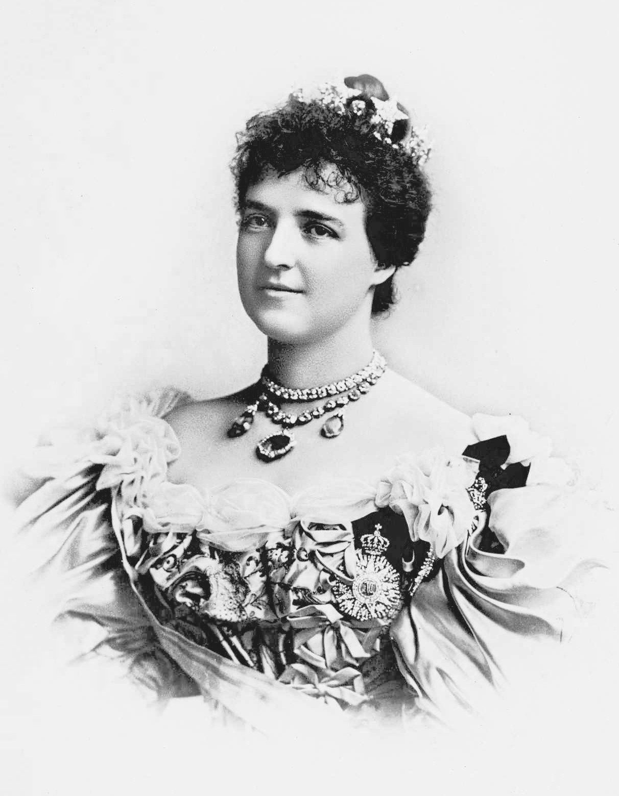 Bilhete postal com retrato da Rainha D. Amélia, ostentando a placa da Ordem de Nossa Senhora da Conceição, e outras condecorações. Impressão fotomecânica. Em legenda: «Sua Magestade a Rainha D. Amelia». S/d. (9x14 cm).Inclui inscrição manuscrita no verso: «Her Magesty the Queen Amelia of Portugal. Don´t you think she is very pretty.»